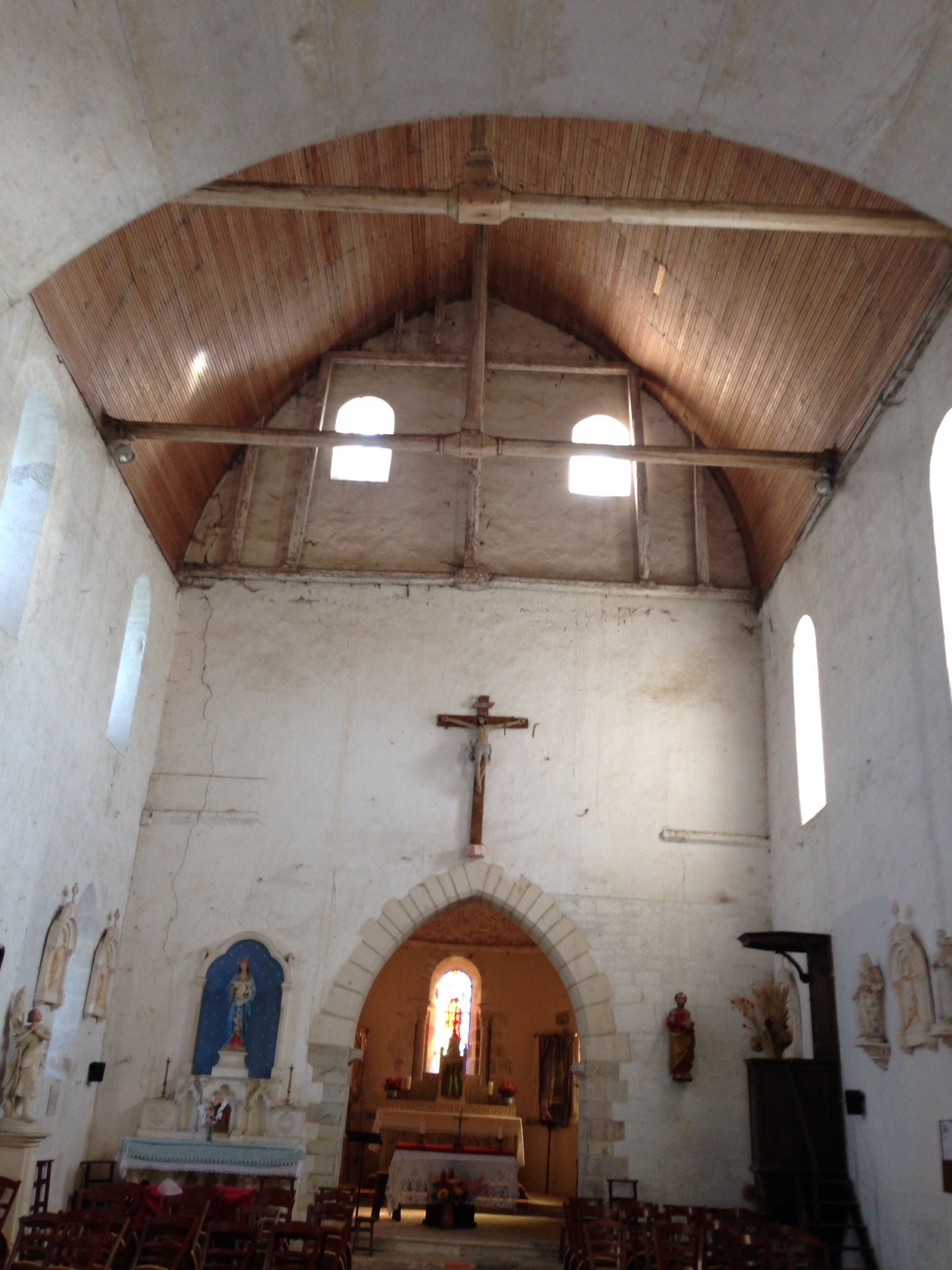 Saint-Pierre-les-Bois - nef et voûte en berceau de bois refait au 16e siècle